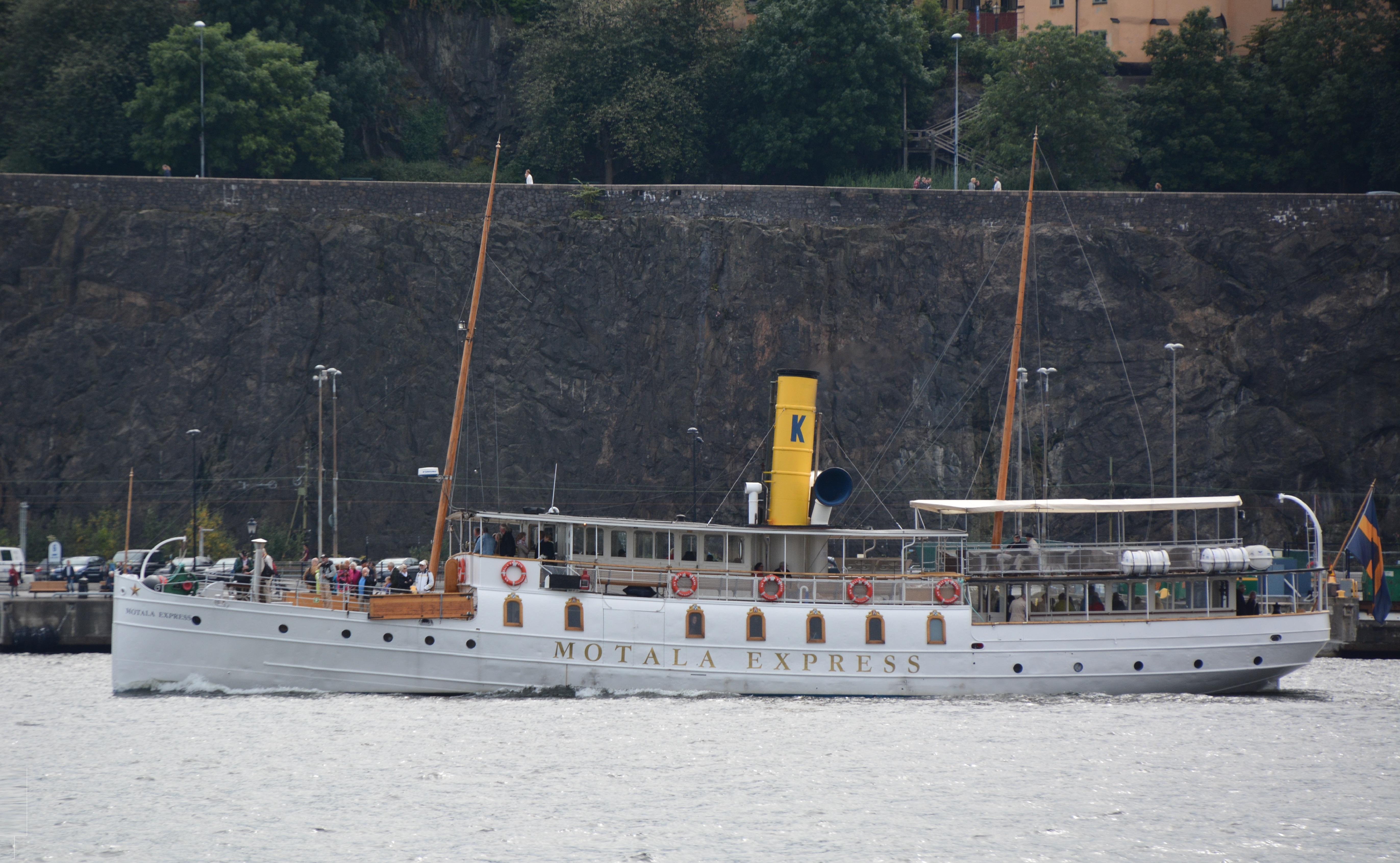 S/S Motala Express in Stockholm harbour in frint of Södermalm sailing eastwards This is an image of a protected Swedish ship, with call sign SFOD .